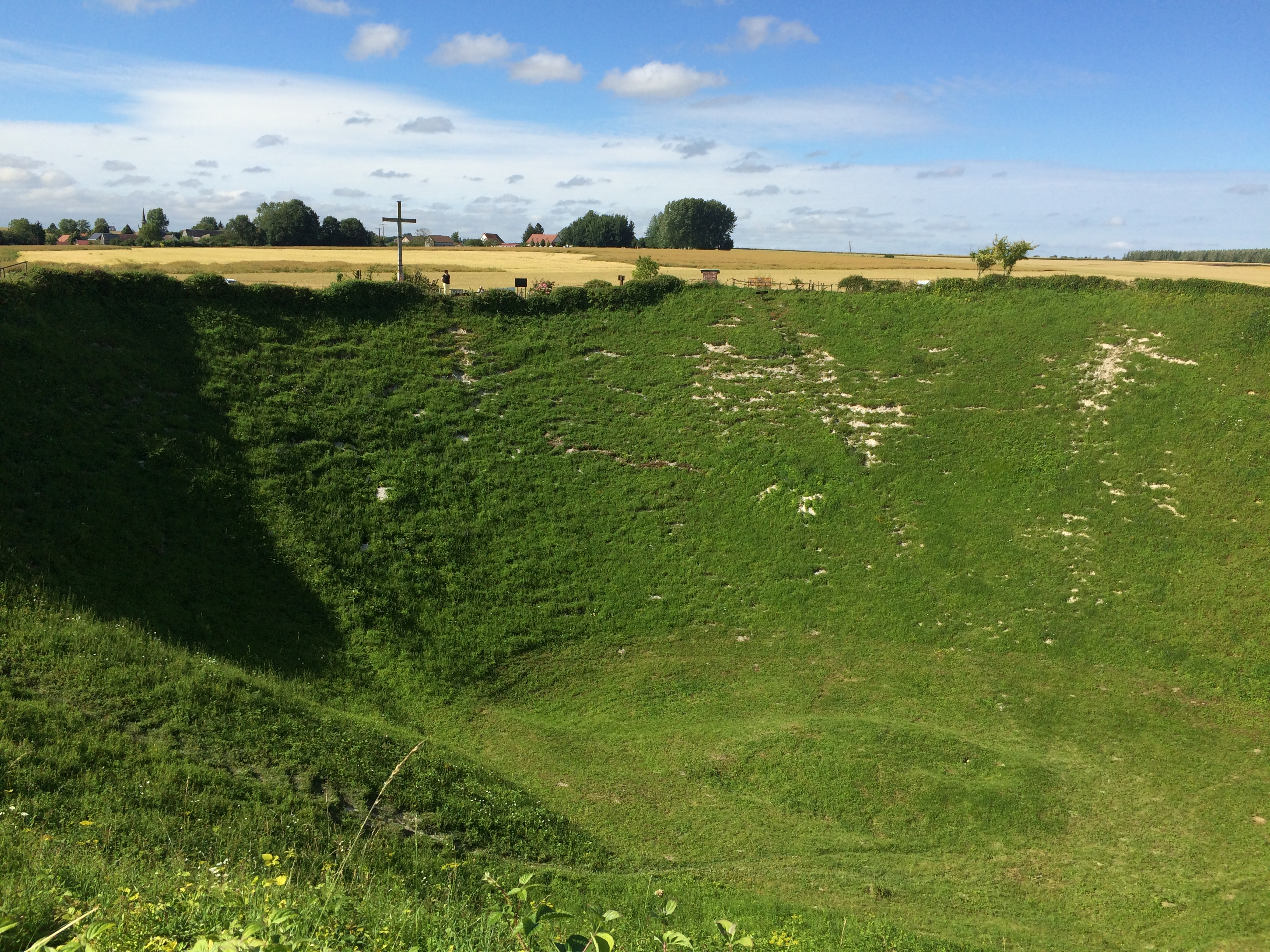 Cráter creado por la explosión de la mina "Lochnagar" el 1 de julio de 1916, primer día de la batalla del Somme. Al fondo se ve el pueblo de Boisselle, que era uno de los objetivos de las tropas británicas.